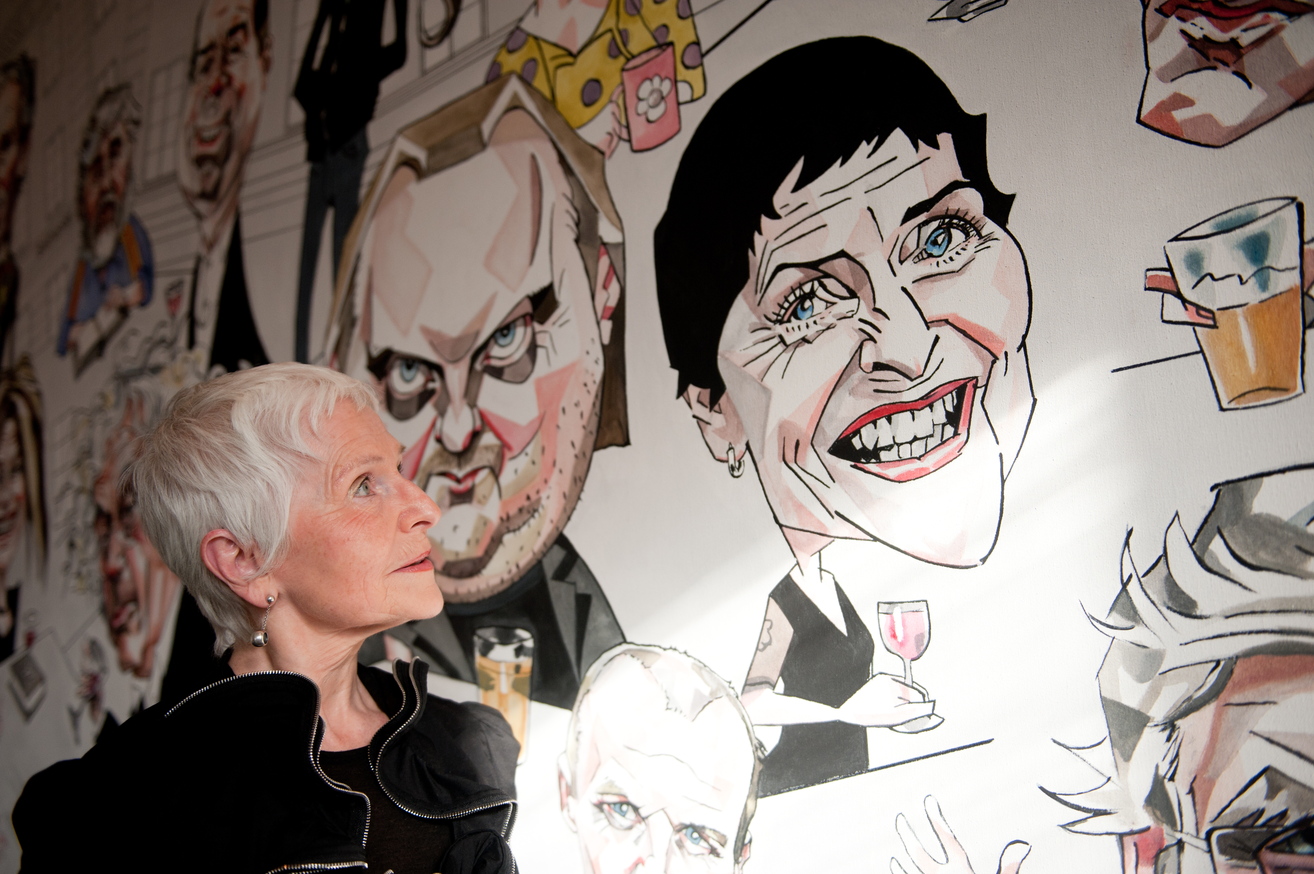 Den norska författaren Herbjørg Wassmo vid ett litteraturseminarium i Oslo 2011-04-11.